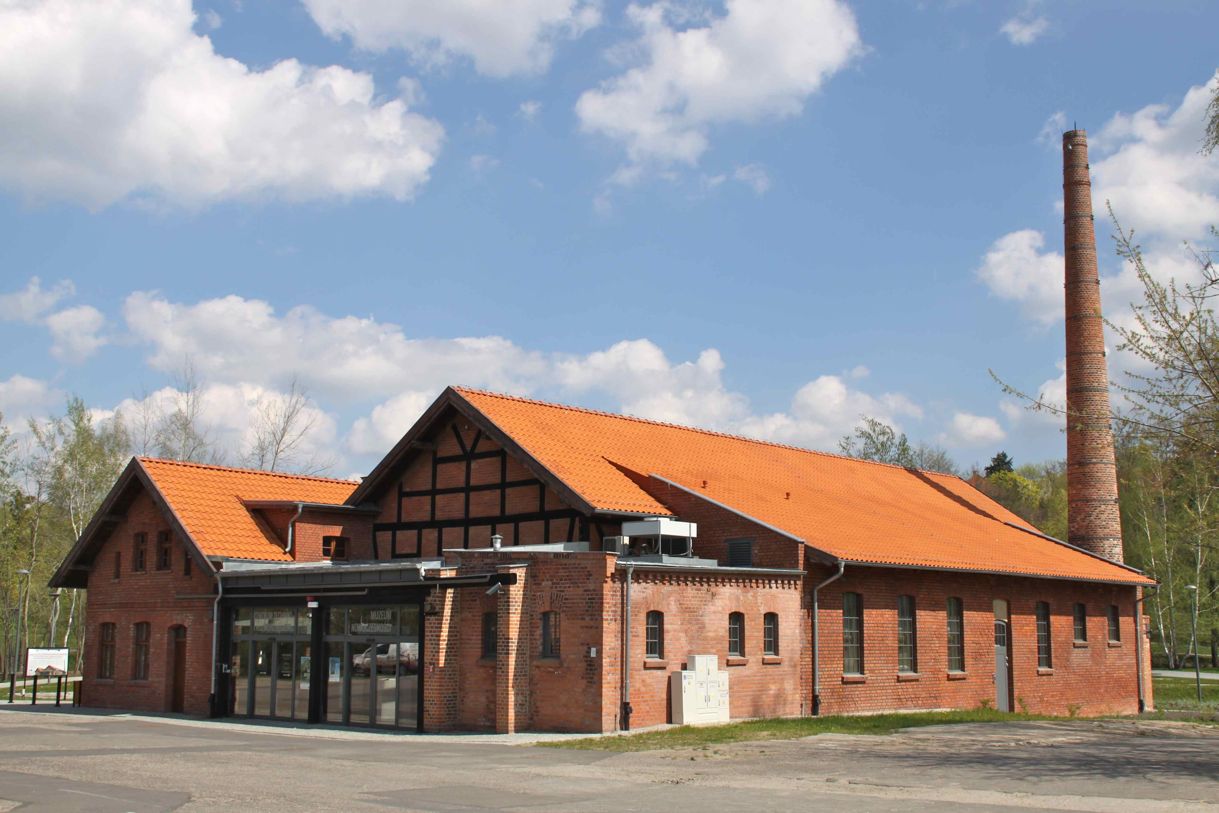 Technikmuseum Allenstein